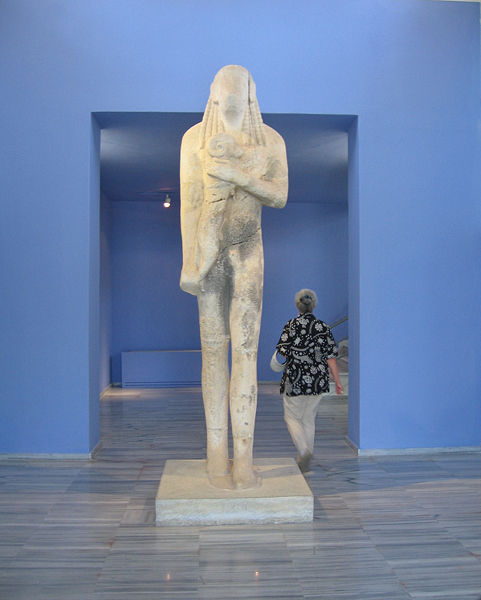 Unvollendeter Kouros, Museum Limena Thasos